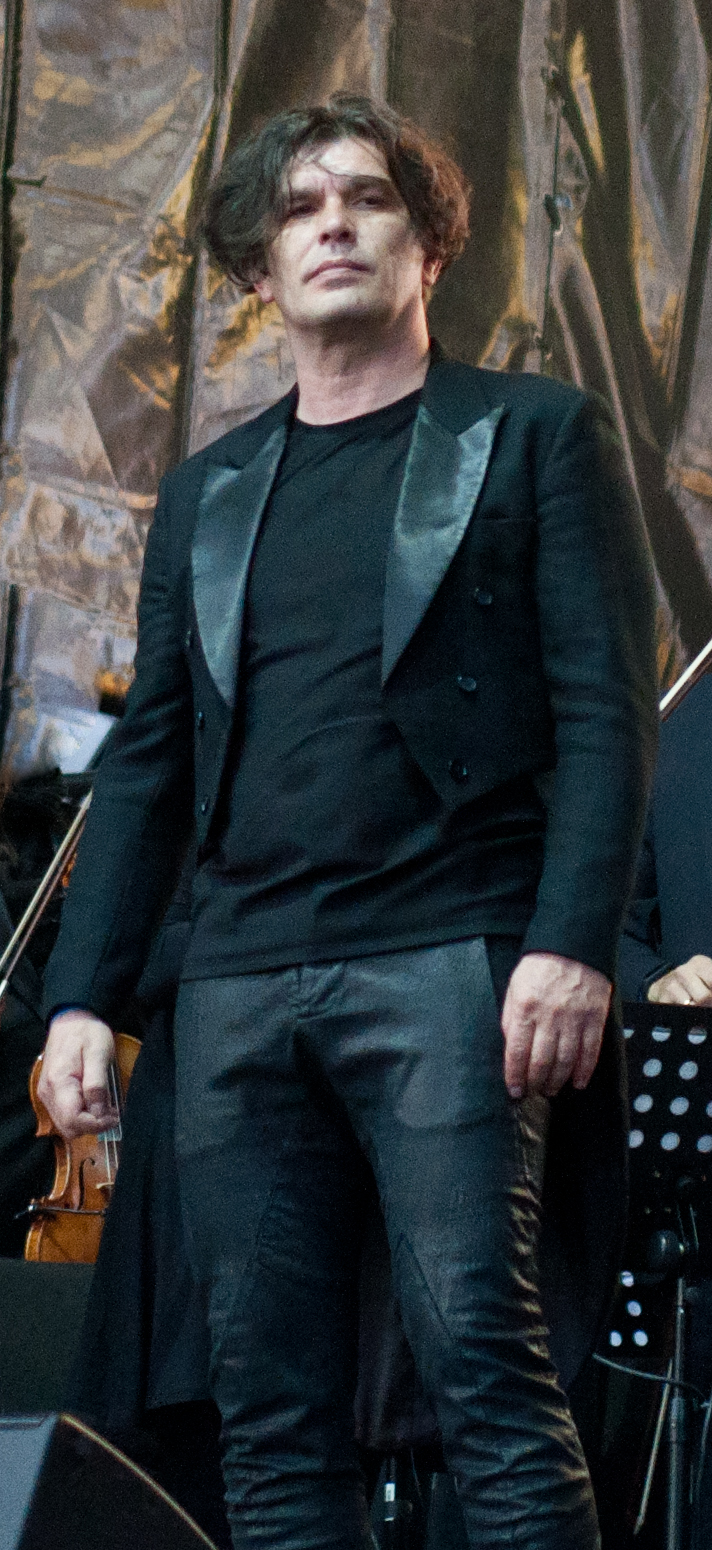 Музыкант Юрий Каспарян во время концерта "Симфоническое Кино"